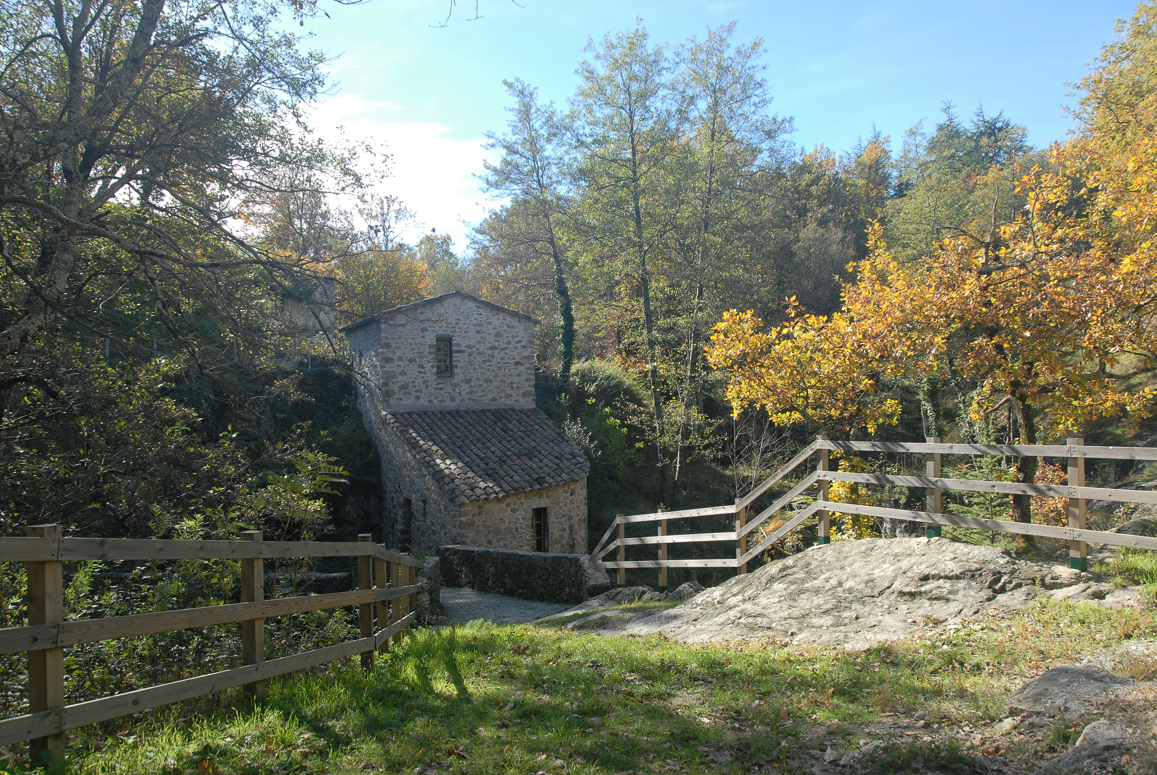 Moulin de la Mouleyrette, Colognac (Gard, France)